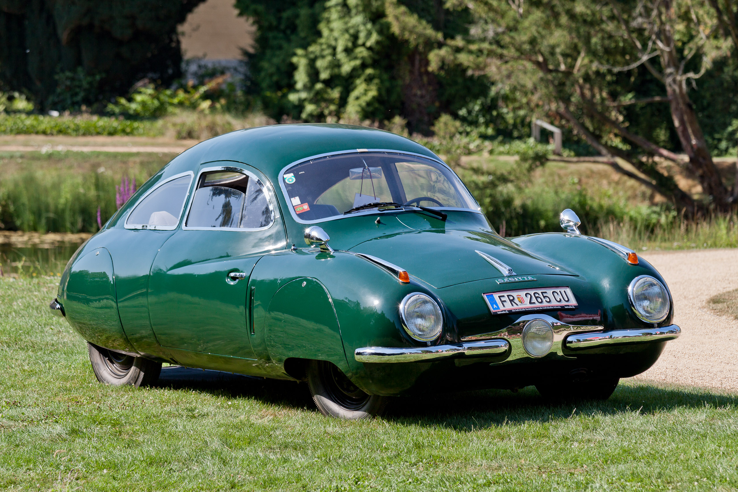 Volkhart V2 Sagitta, Classic Days, Klassiker- & Motorfestival, Cannoneer Photography